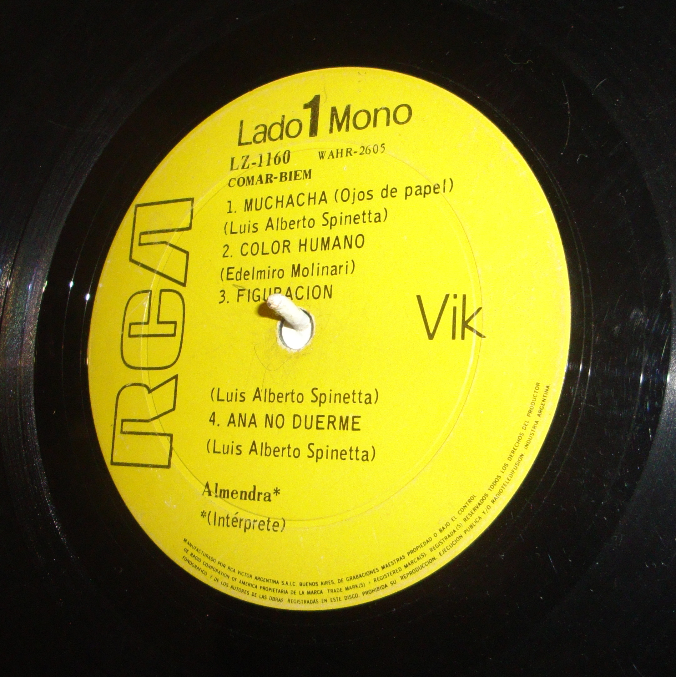 Disco de vinilo de Almendra, editado en Argentina en 1969.